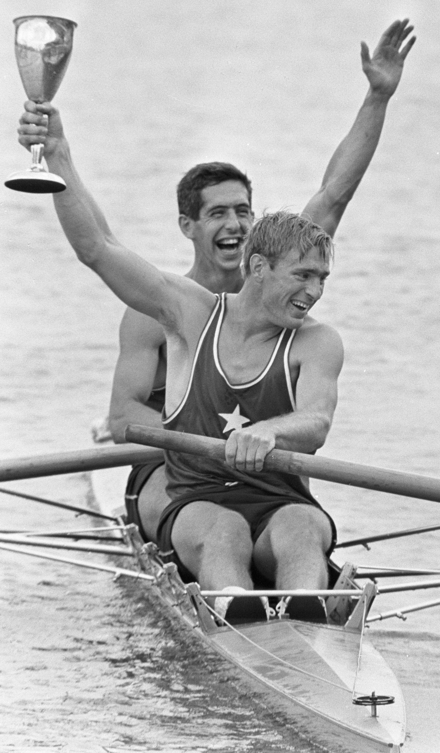 Roeien Bosbaan regatta. Elste twee zonder gewonnen door Amerikanen Johnson en Hou met beker.